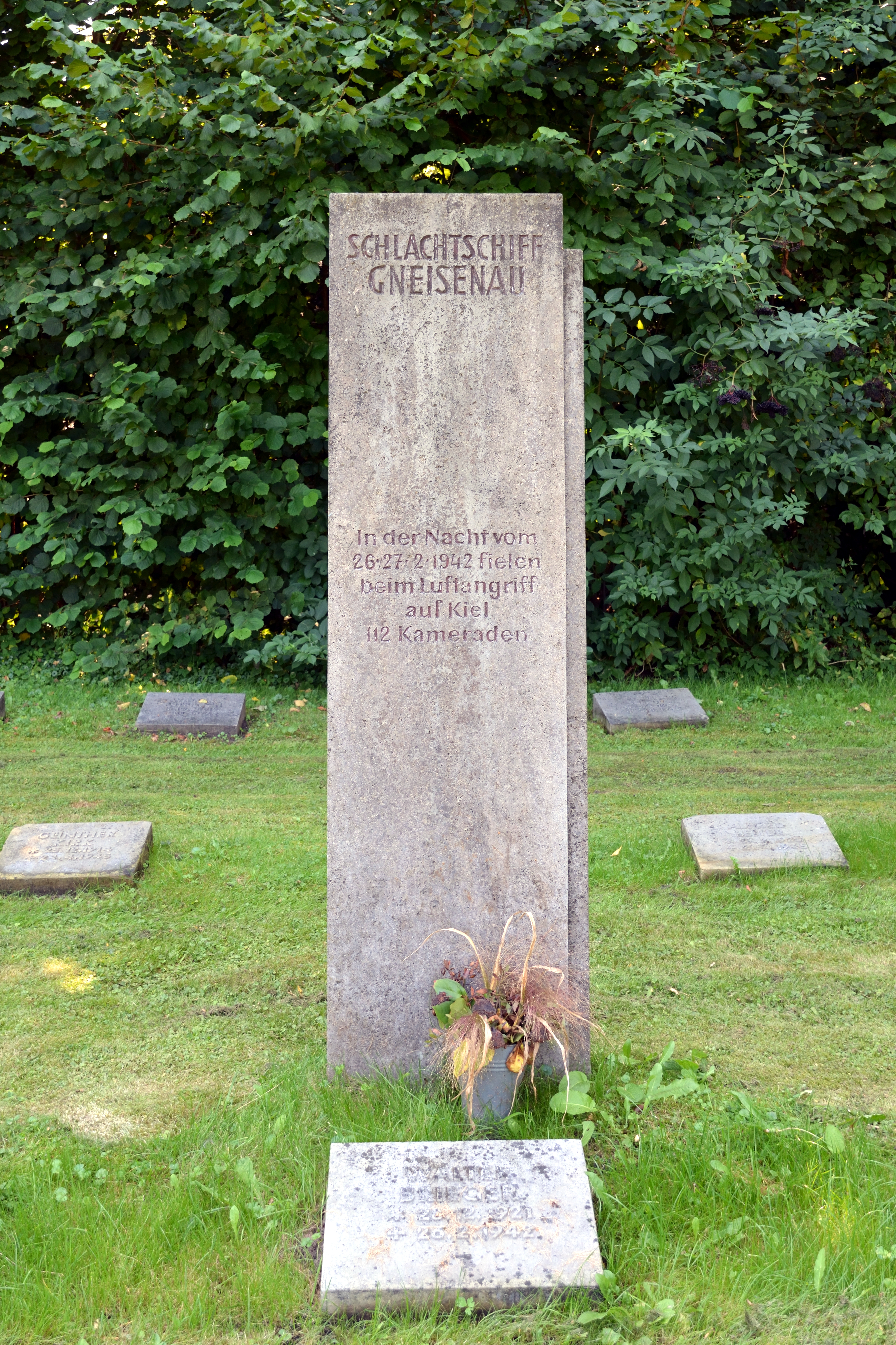 Impressionen aus dem Nordfriedhof in Kiel Ein Grossteil diese Friehofes ist den Gefallenen der beiden Weltkrige gewidmet.